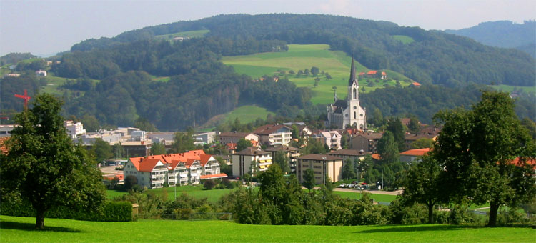 Bazenheid (Kirchberg SG), September 2004, selbstfotografiert, GNU-FDL